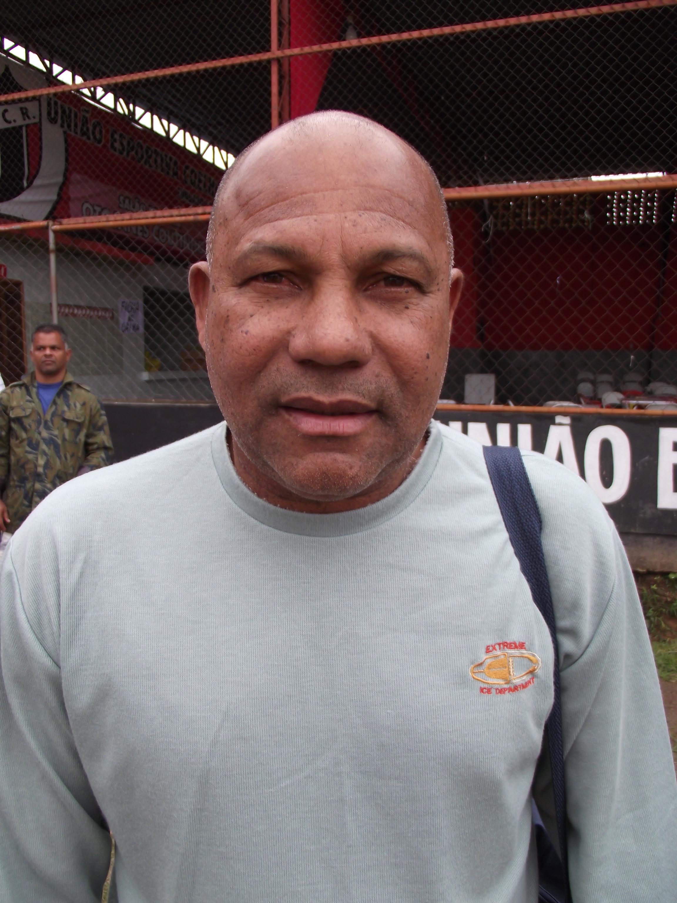 Edevaldo Cavalo, ex-lateral direito de Vasco, Fluminense, Internacional e Seleção Brasileira.